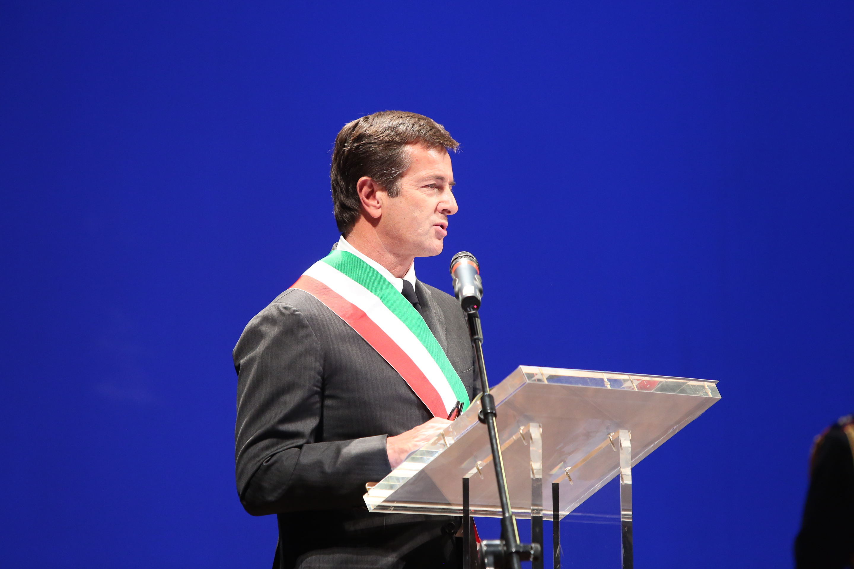 Giorgio Gori alla cerimonia delle benemerenze civiche 2016, al teatro Sociale di Bergamo Alta